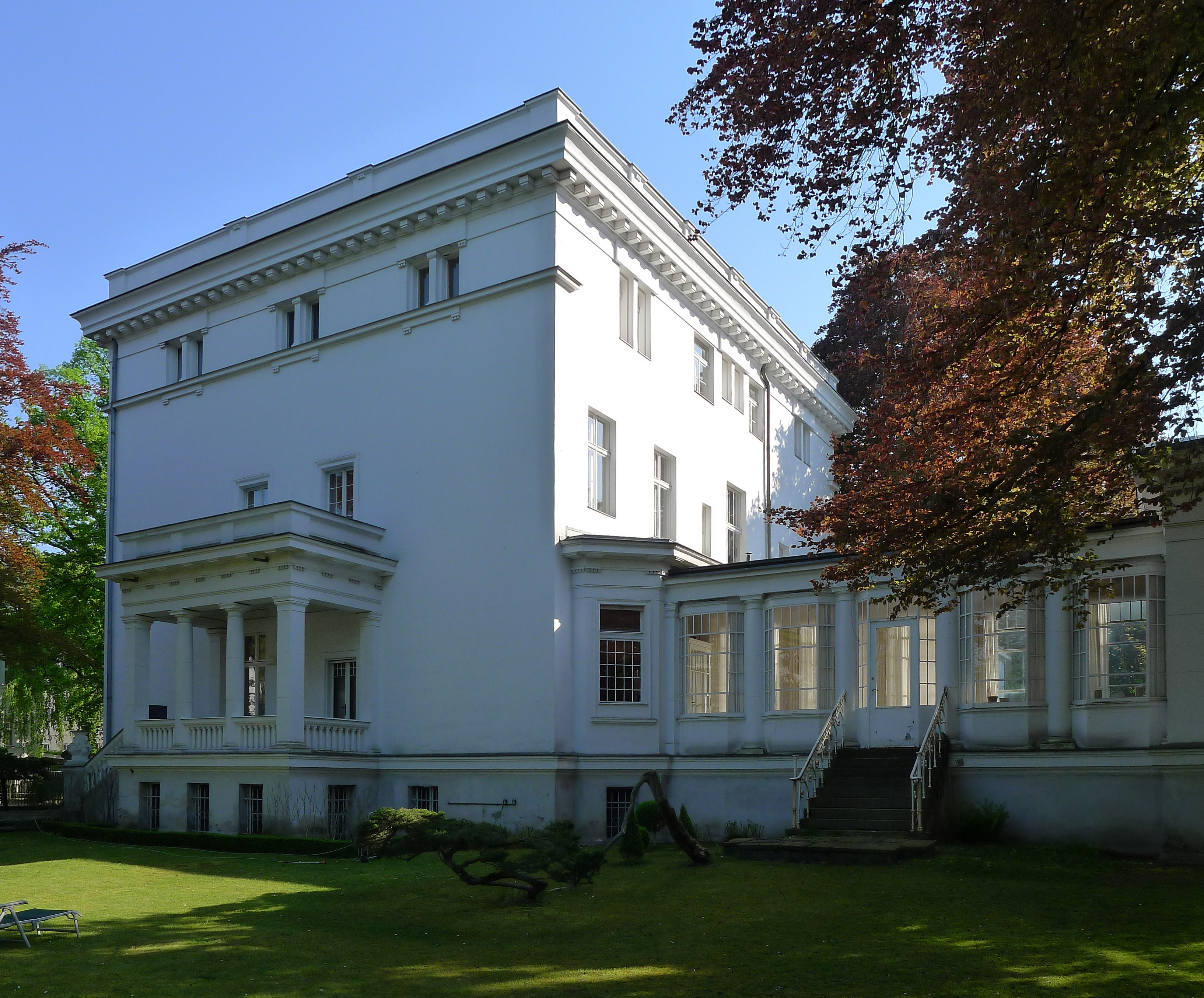 Villa